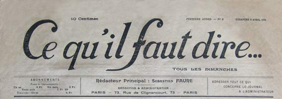 Ce qu'il faut dire est un journal anarchiste fondé le 2 avril 1916 par Sébastien Faure et d'autres anarchistes pour s'élever contre la guerre et le « Manifeste des Seize ». Censuré, pas une ligne du contre-manifeste présent dans le premier numéro ne pourra être publiée. - 2 du 9 avril 1916